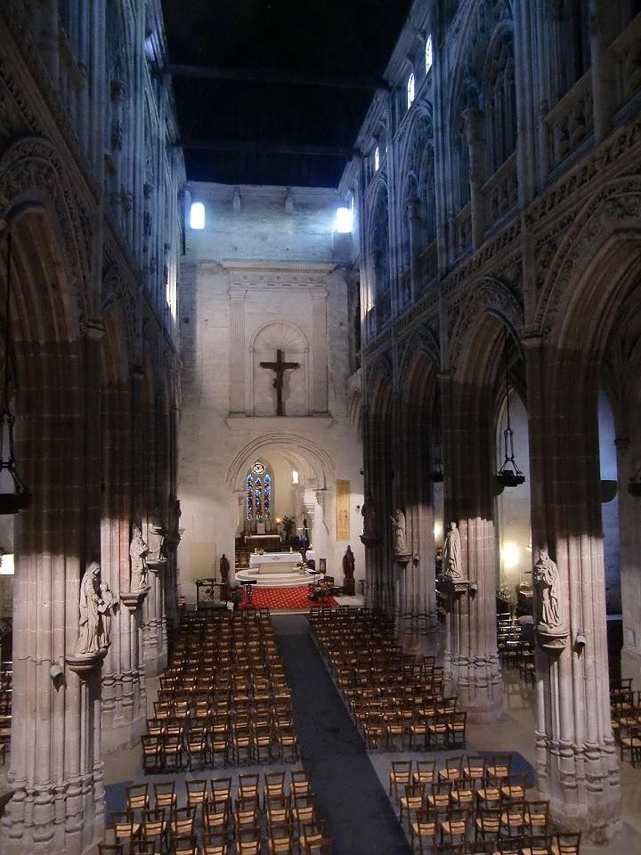 Eglise Saint-Ouen de Pont-Audemer (Eure, Normandie, France) - la nef vue de la tribune de l'orgue